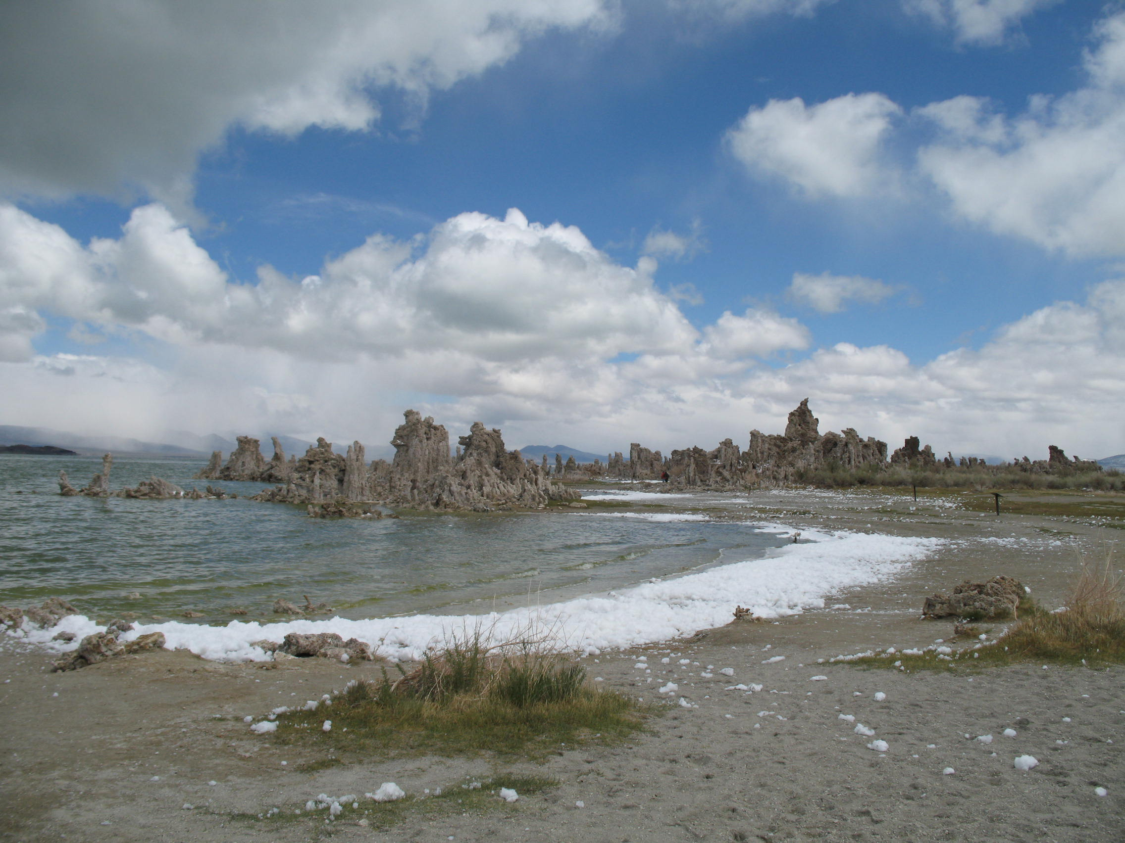 Mit Schaum bedeckter Strandabschnitt der South Tufa Area des Mono Lakes.